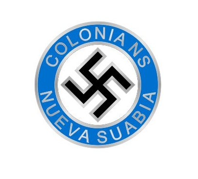 MTÜ La Colonia tunnus